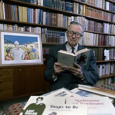 Forfatter av "Vangsgutane", - Leif Halse fotografert i 1978